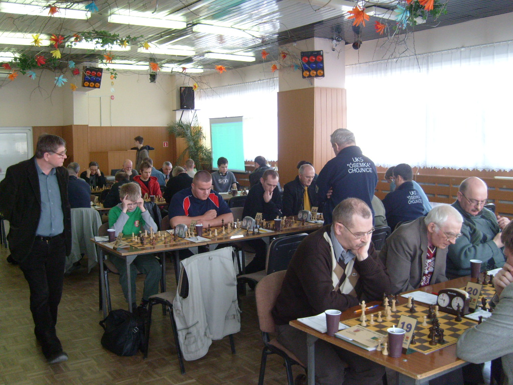 Finał rozgrywek o Drużynowe Mistrzostwo Kujawsko-Pomorskiego Związku Szachowego w sezonie 2008/09. 11 runda III ligi, Toruń - klub "Jantar", 29 marca 2009 (z lewej sędzia główny rozgrywek, Ulrich Jahr).